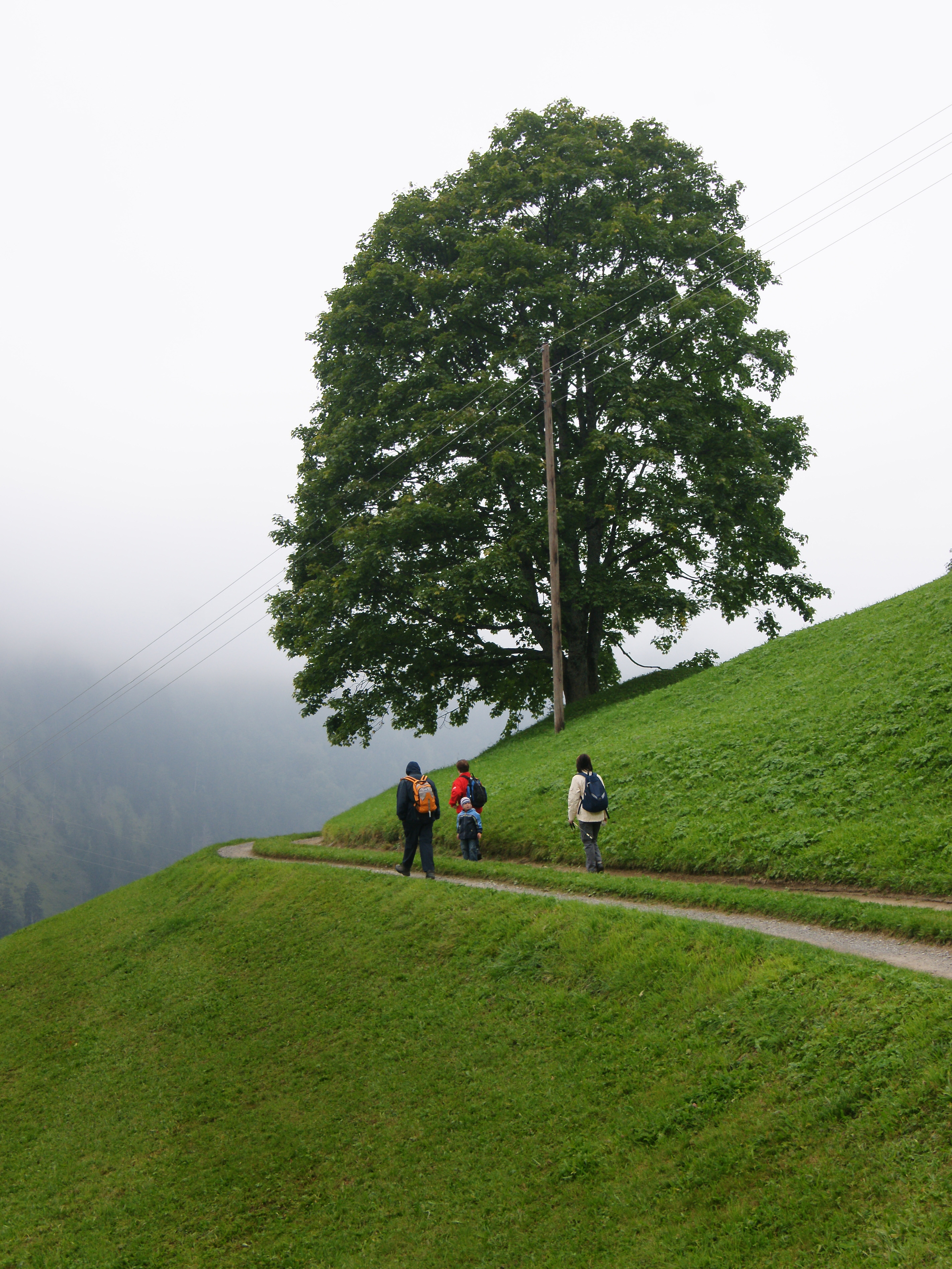 Der Bergahorn (Acer pseudoplatanus) ist eine Baumart aus der Gattung der Ahorne (Acer). Er ist in Europa waldbaulich ein wichtiger Vertreter seiner Gattung. Wanderer in Marul bei Raggal im grossen Walsertal, Vorarlberg.